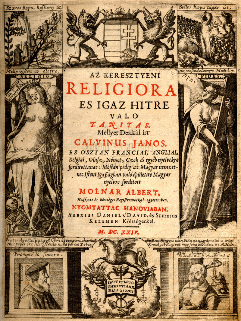 Kálvin János: Institutio Christianae religionis című műve Szenczi Molnár Albert által készített magyar fordításának címlapja